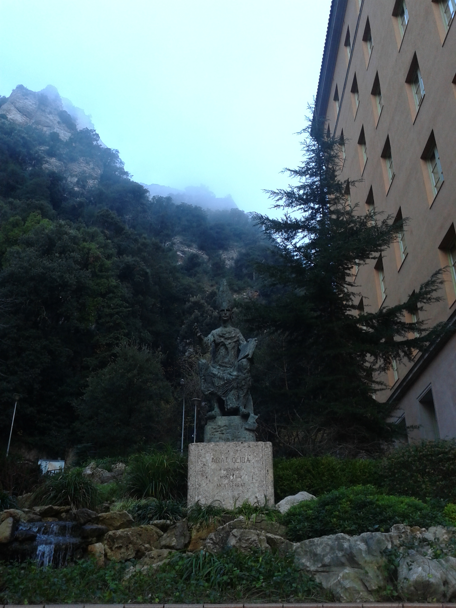 Մոնսերրատի աբբայության բակը